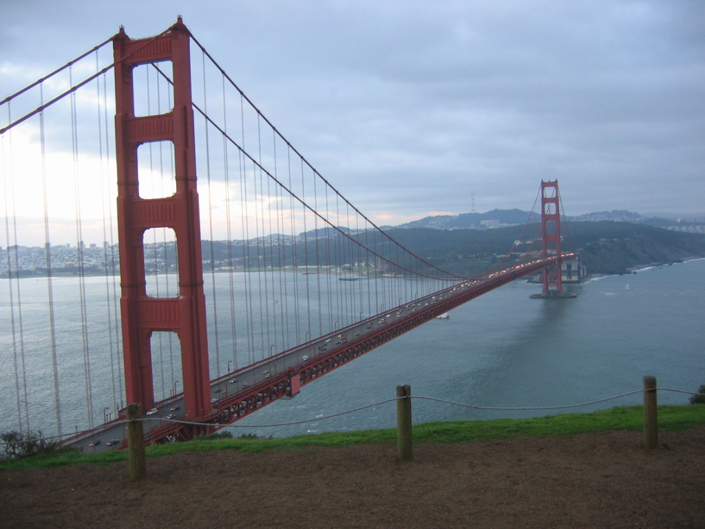 Golden Gate BridgeHome